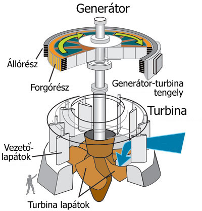 Vízturbina